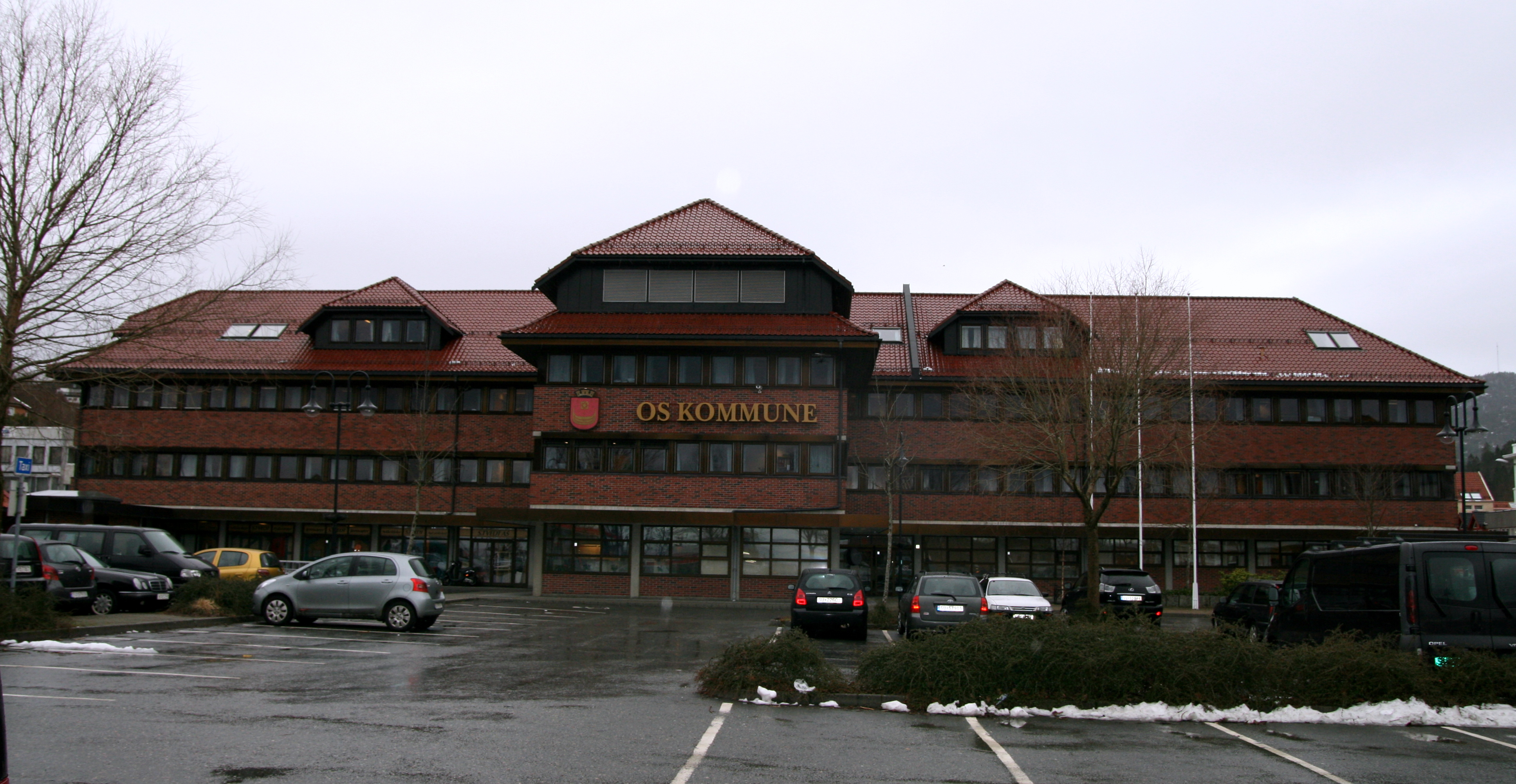 Os kommunehus